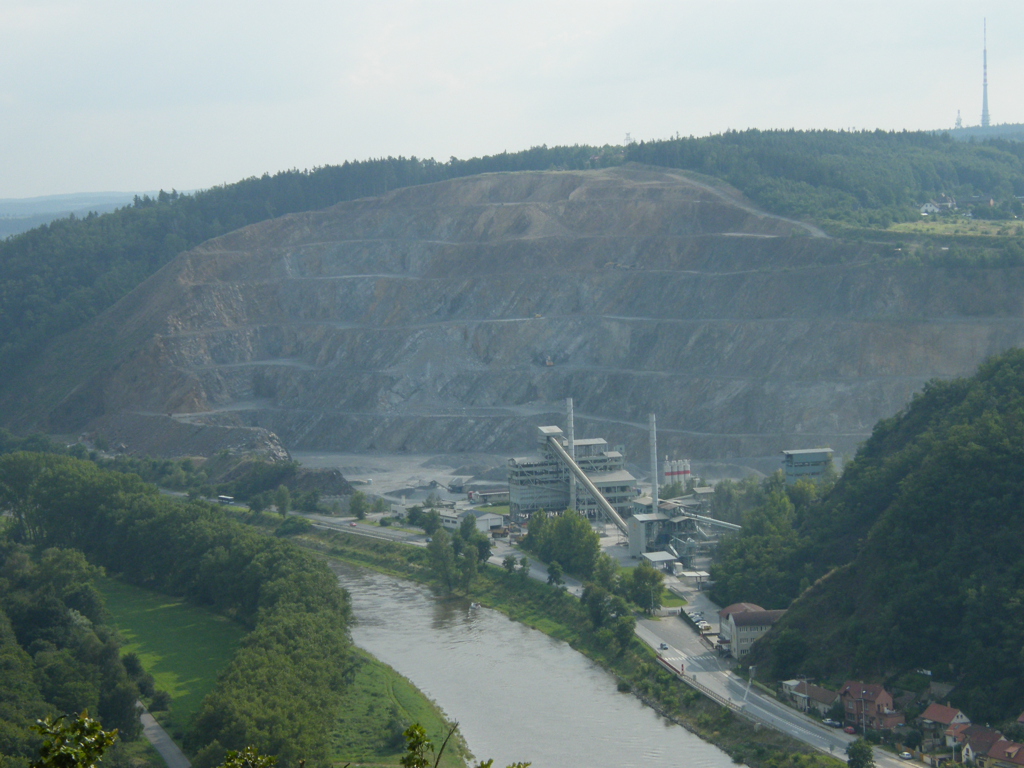 Zbraslavský lom, foceno z 49°57'54.79"N, 14°24'4.085"E (Výhled cestou na Závist)